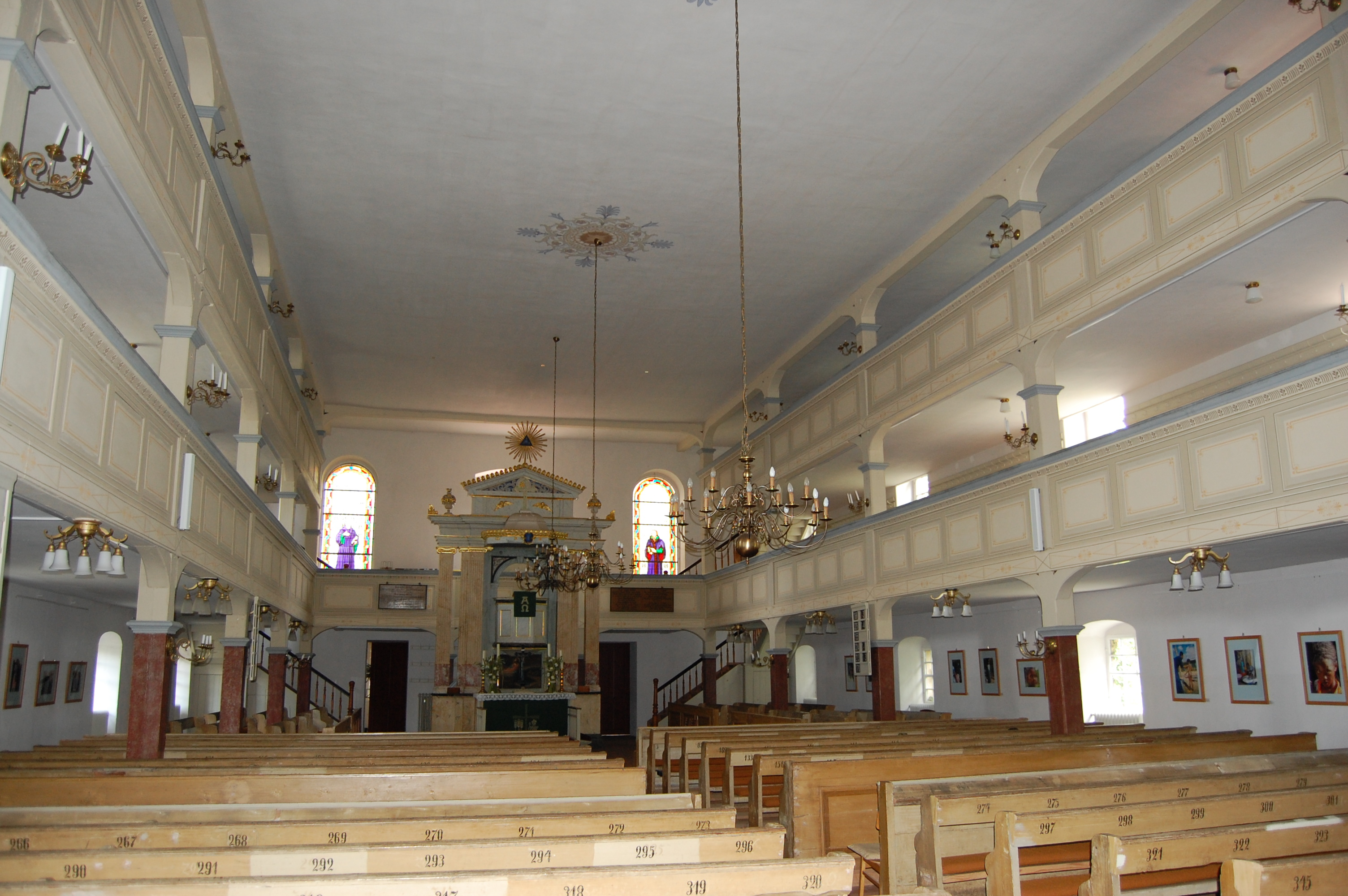 Pfarrkirche Burg (Spreewald), Blick zum Altar